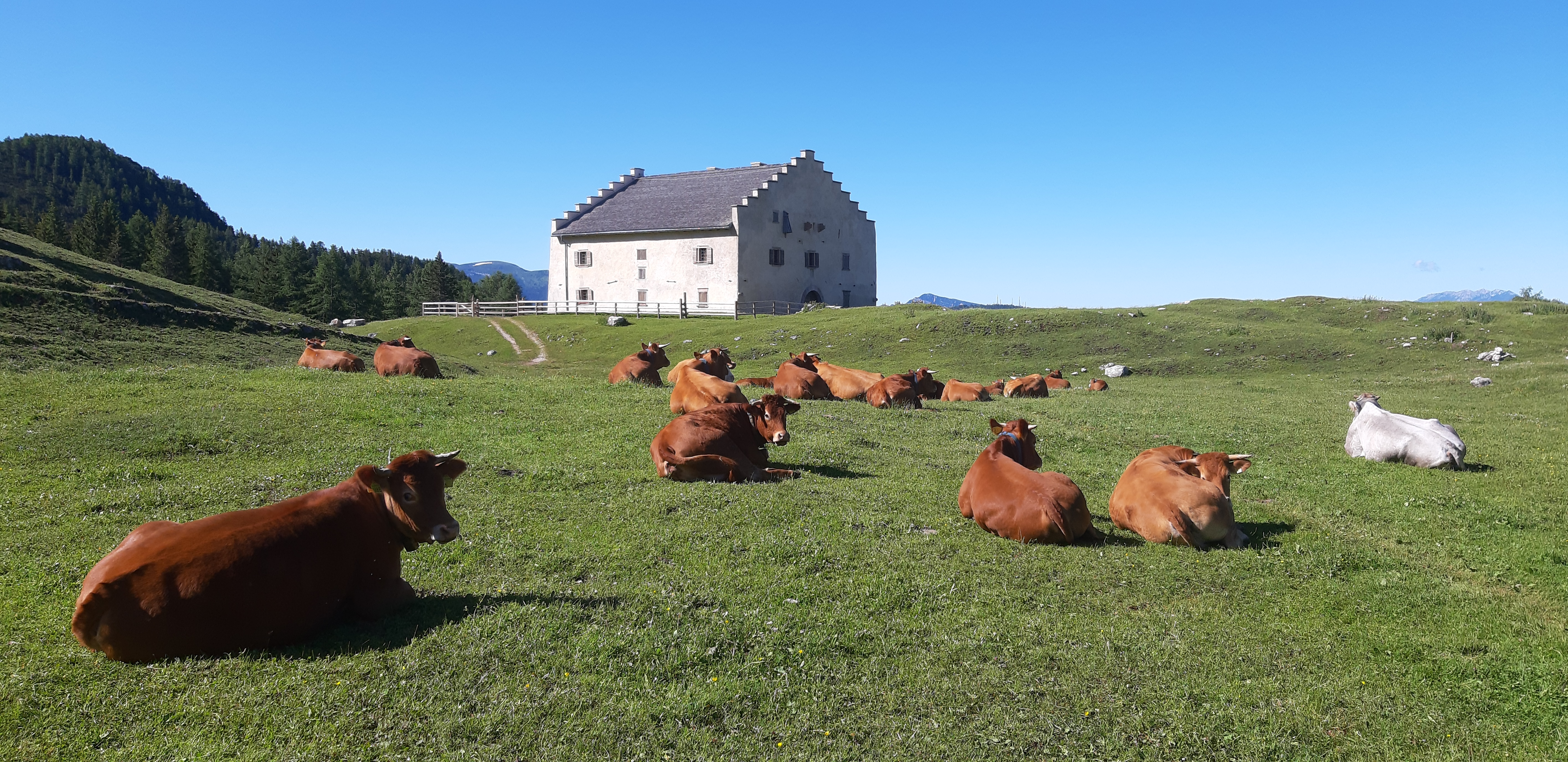 Malga Palazzo. Riserva naturale guidata della Scanuppia (Q3936809)